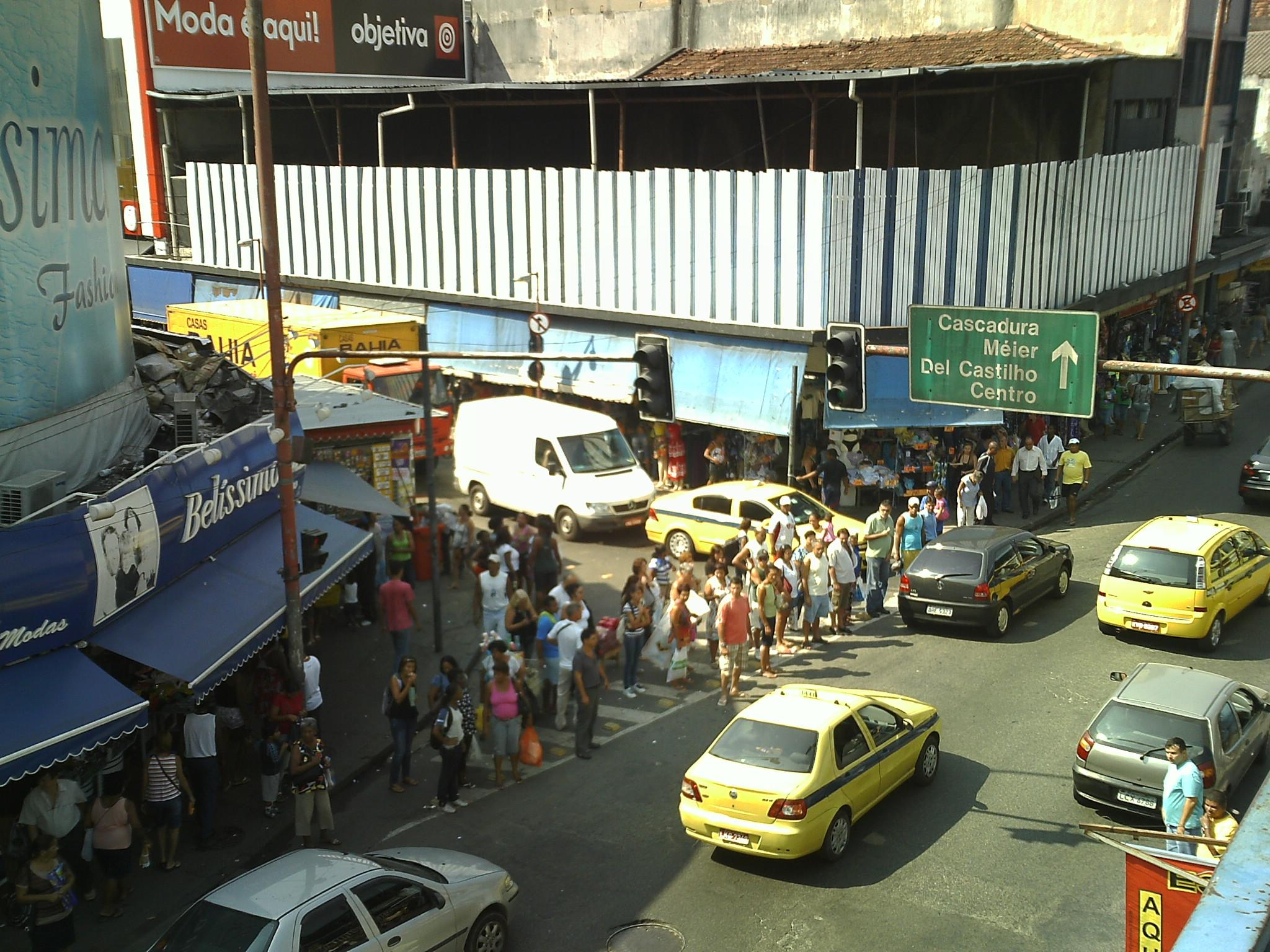 Madureira.